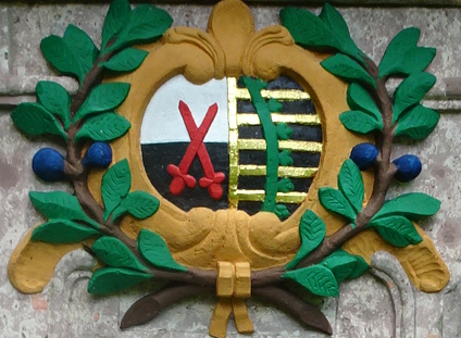 Jagdsäule Marienberg, zur Erinnerung an eine große Jagdveranstaltung von König Friedrich August I